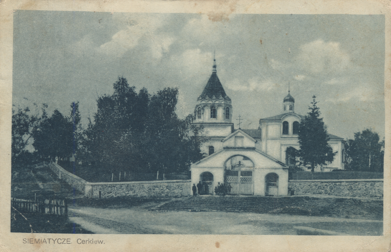 Беларуская (тарашкевіца): Сямятычы (Siamiatyčy). Петрапаўлаўская царква-мураўёўка